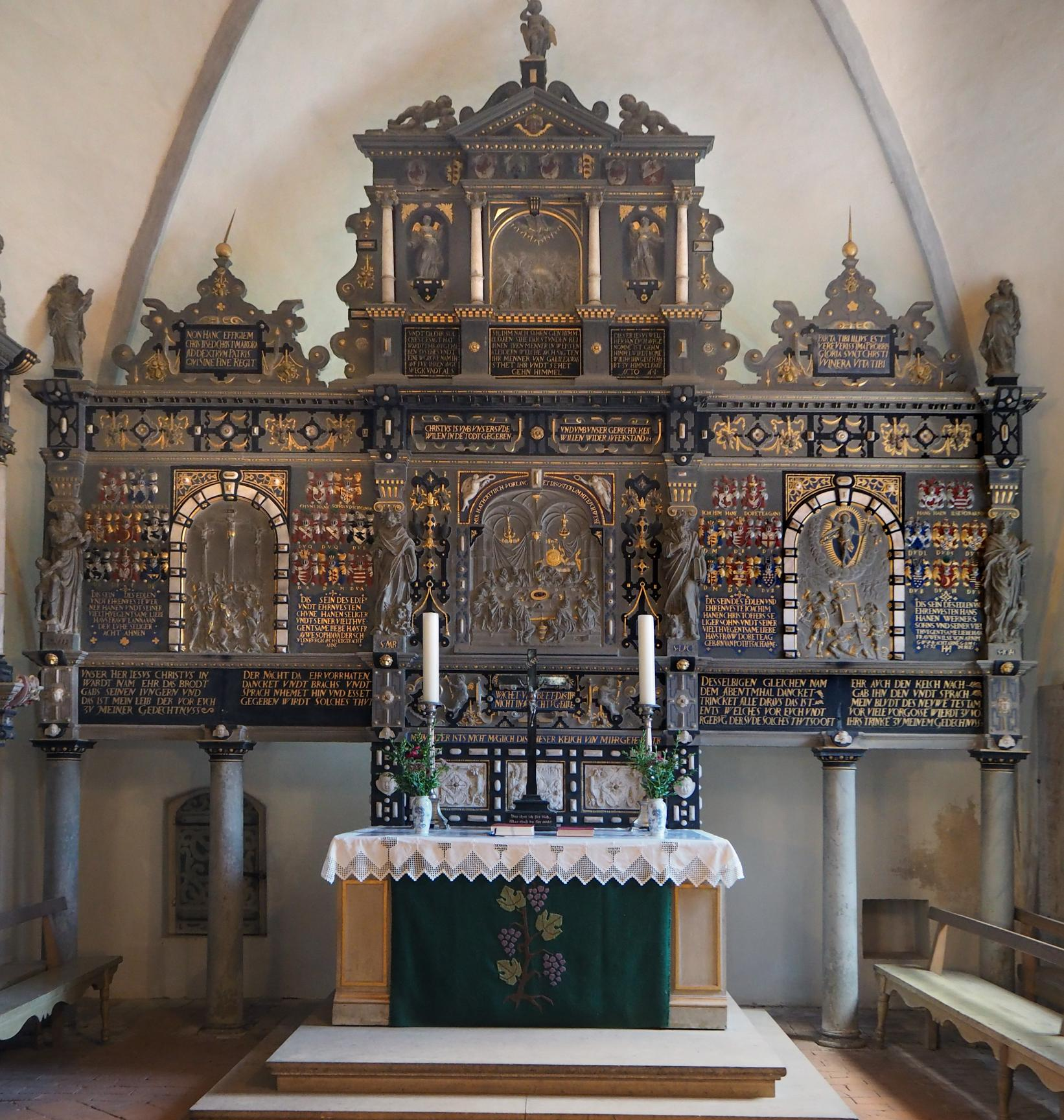 Basedow, Mecklenburg-Vorpommern, Dorfkirche, Altar, Foto: September 2015